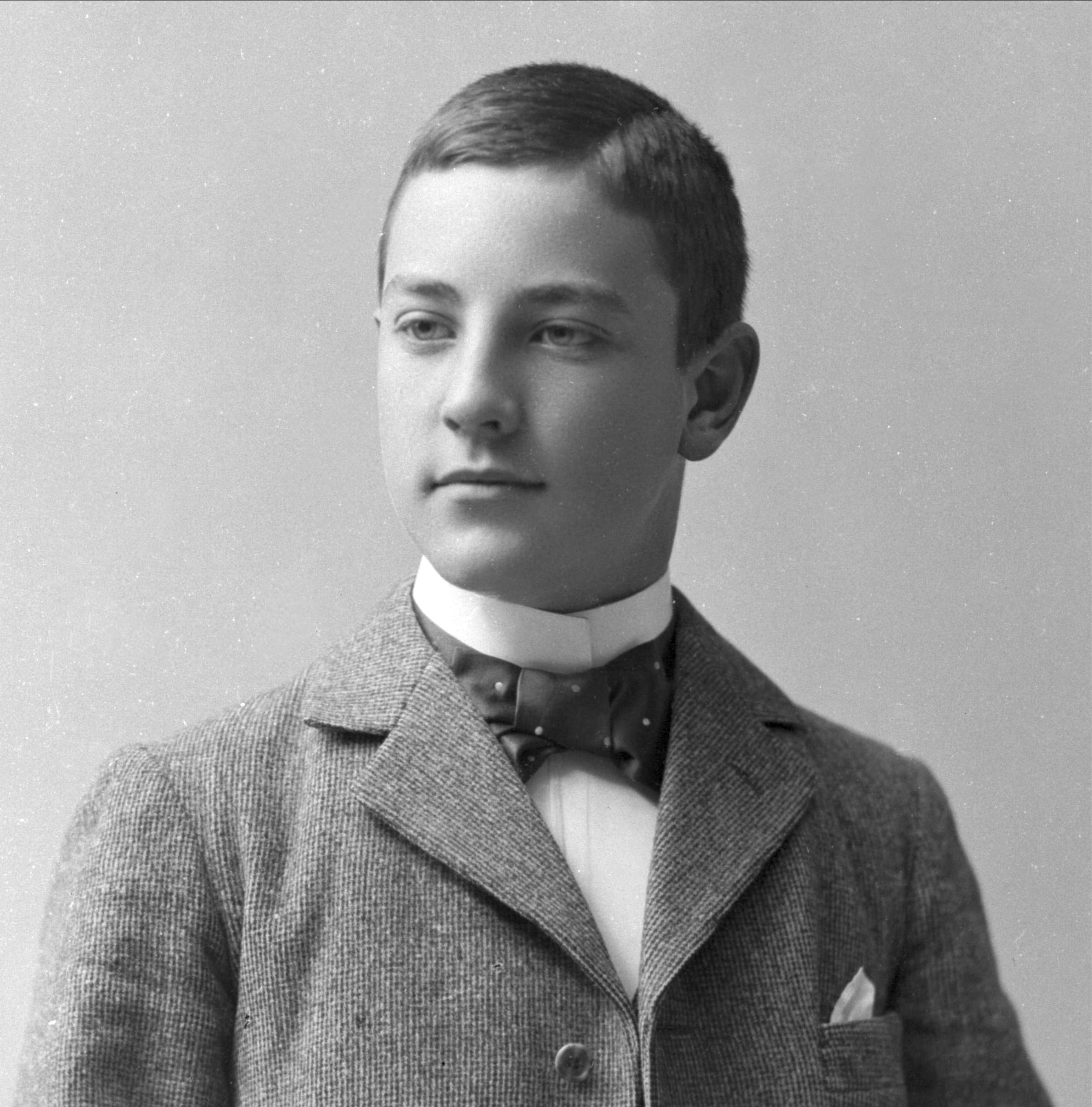 Axel Collett, brukseier, Firma Albert Collett